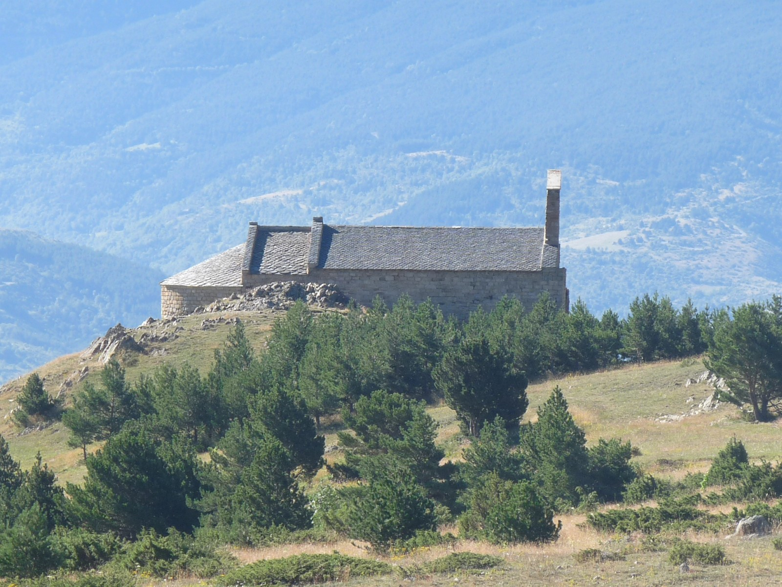 Vue du nord, Chapelle du Belloc, Dorres, Pyrénées-Orientales, France